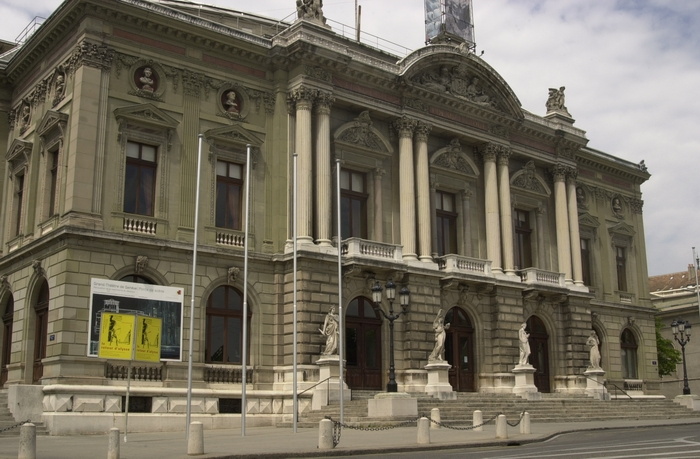 Le grand théâtre de Genève